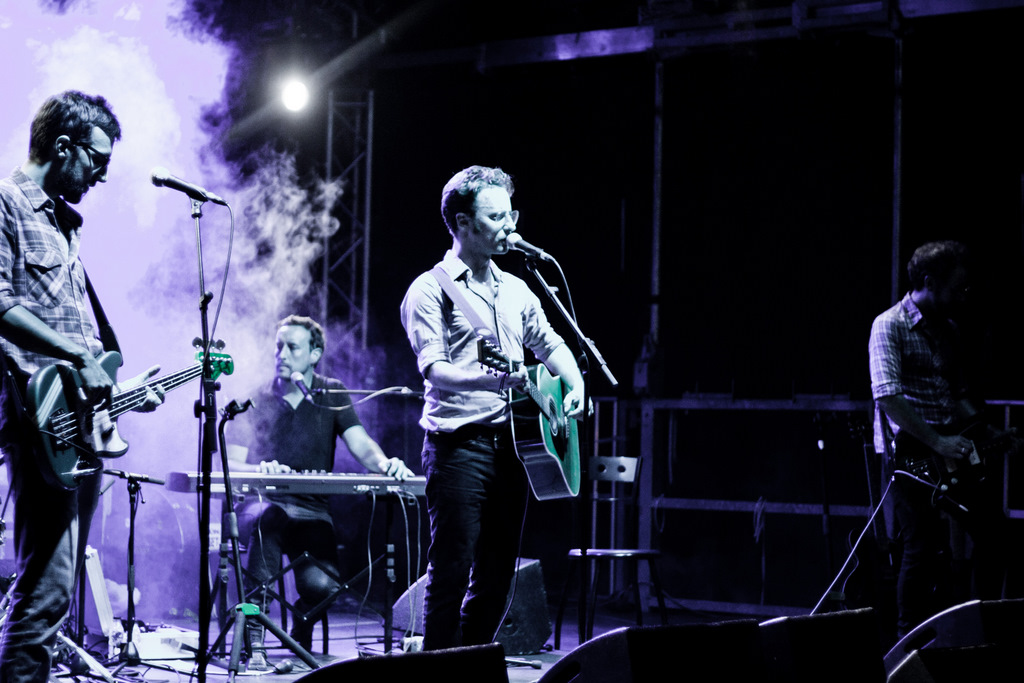 Mishima a Tarragona 2010; Xavi Caparrós, Marc Lloret, David Carabén i Dani Vega.